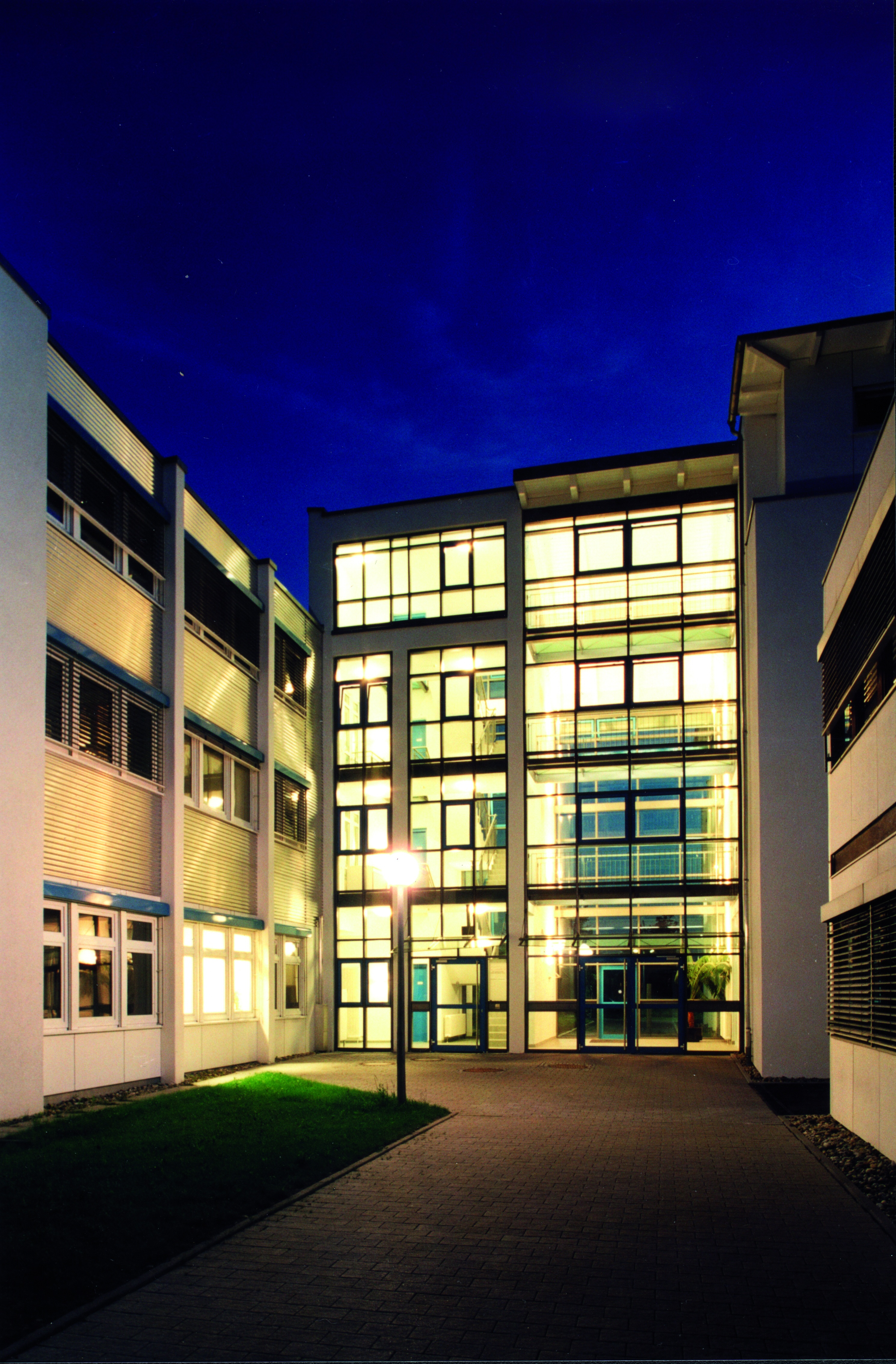 Nachtaufnahme_Softwarezentrum